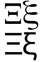 greek letter xi